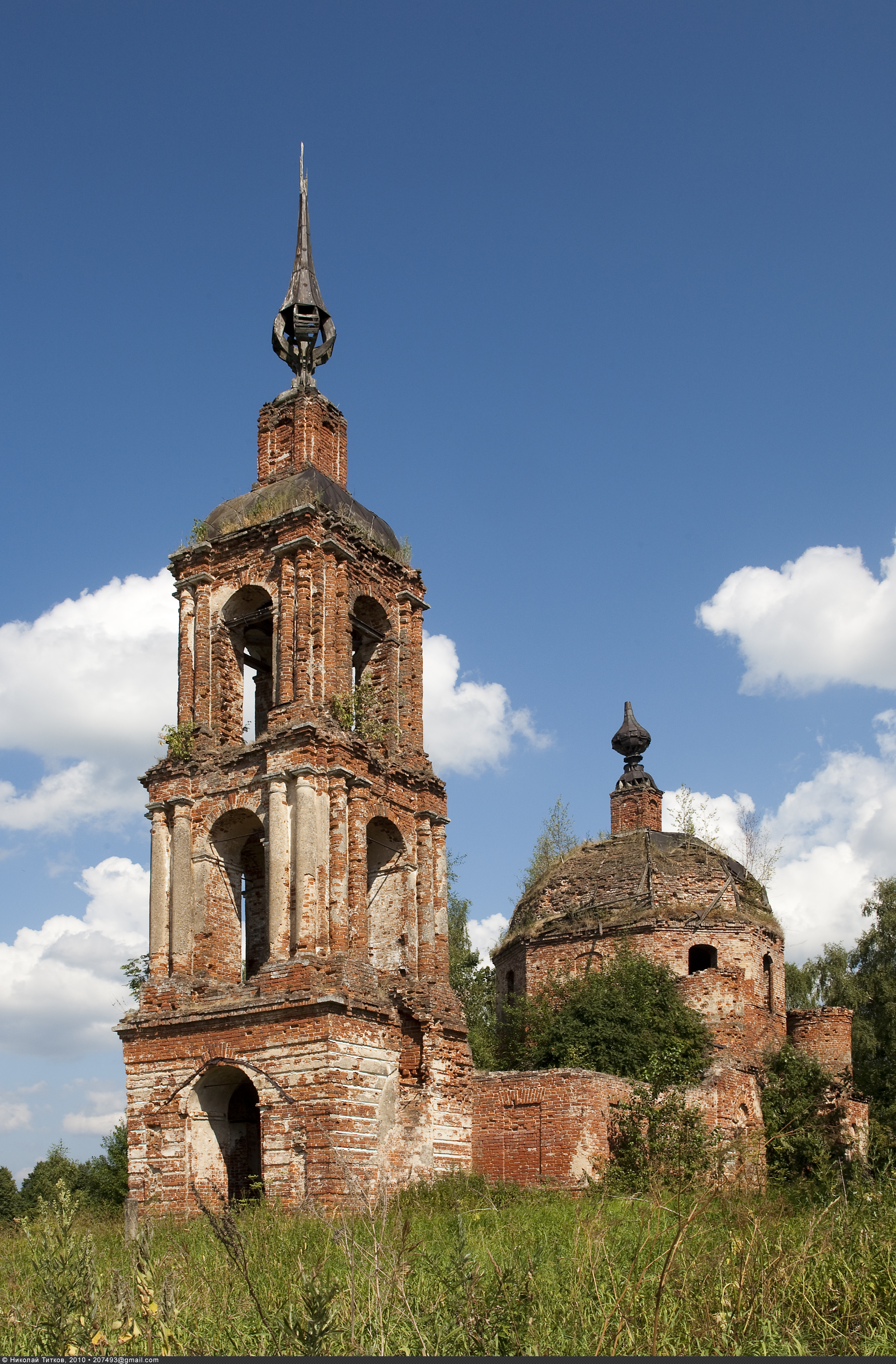 Храм Рождества Пресвятой Богородицы в селе Гора Пневиц (Тверская область, Калязинский район). Кирпичная церковь, построенная в 1795 году. Здание типа восьмерик на четверике с небольшой трапезной и трёхъярусной колокольней в стиле классицизма. Интересна малыми декоративными куполами, поставленными над углами основного объёма здания. Приделы в трапезной Никольский и Иоанно-Богословский (с 1830 года). Закрыта в 1930-х годах, в настоящее время заброшена, в тяжёлом состоянии.